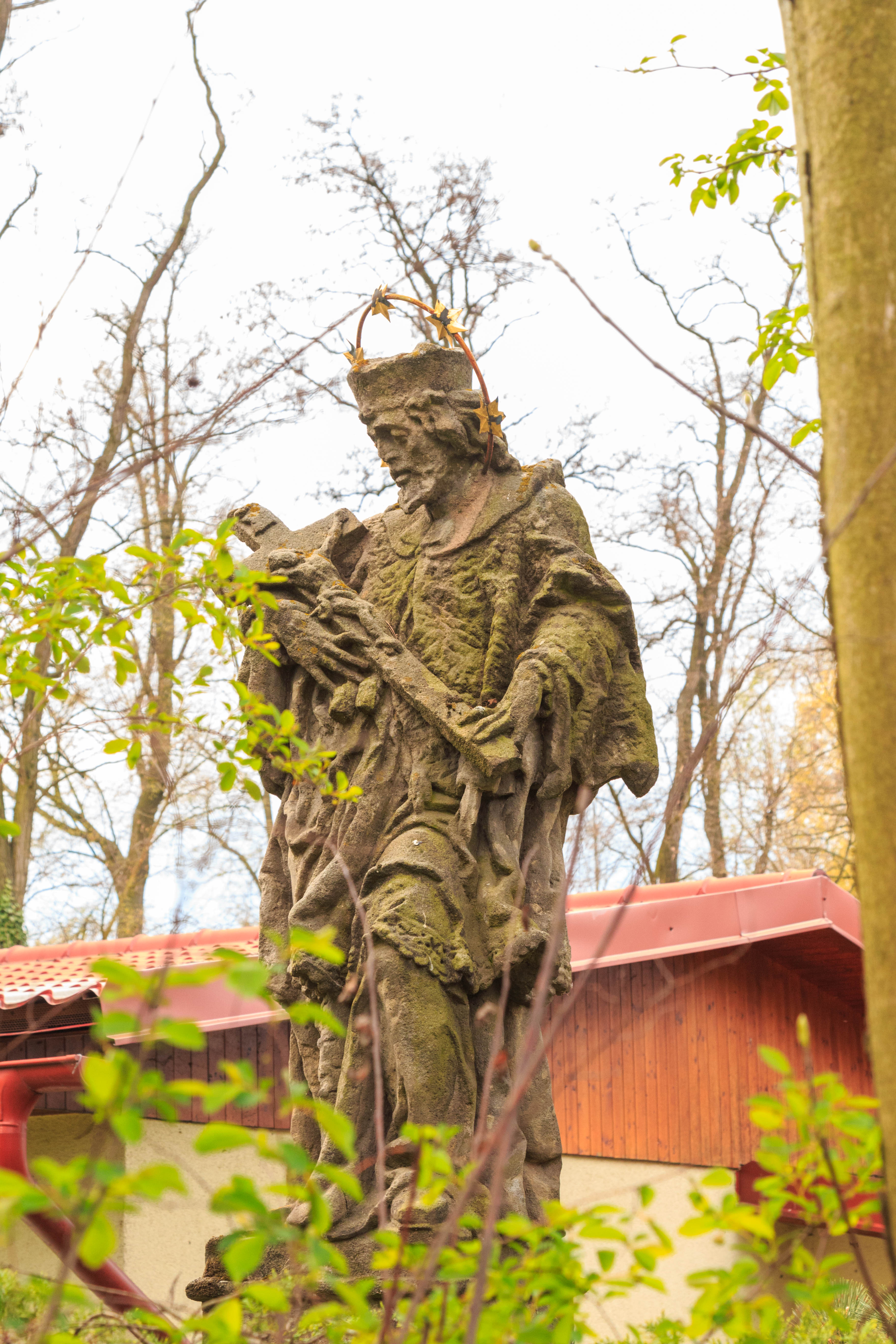 Socha svatého Jana Nepomuckého, u mostu přes Opatovický kanál, Staré Ždánice.